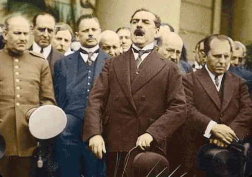 Manuel Carlés (1875-1946), président de la Ligue patriotique argentine (Liga Patriótica Argentina). Probablement années 1920.